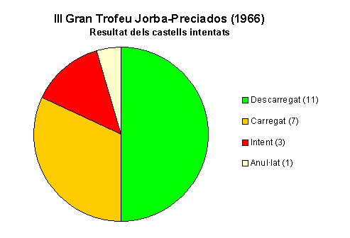 Estadística dels 22 castells intentats al III Gran Trofeu Jorba-Preciados, celebrat el 25 de setembre de 1966 a l'Avinguda del Portal de l'Àngel de Barcelona.